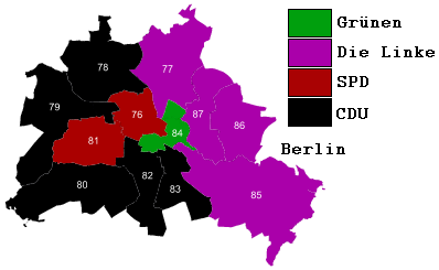 Carte des Districts Berlinois lors des élections fédérales de 2009.